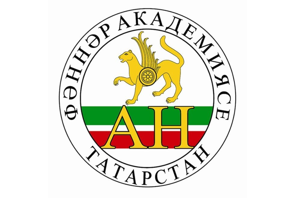 Татарча/tatarça: Татарстан республикасының Фәннәр академиясенең туграсы